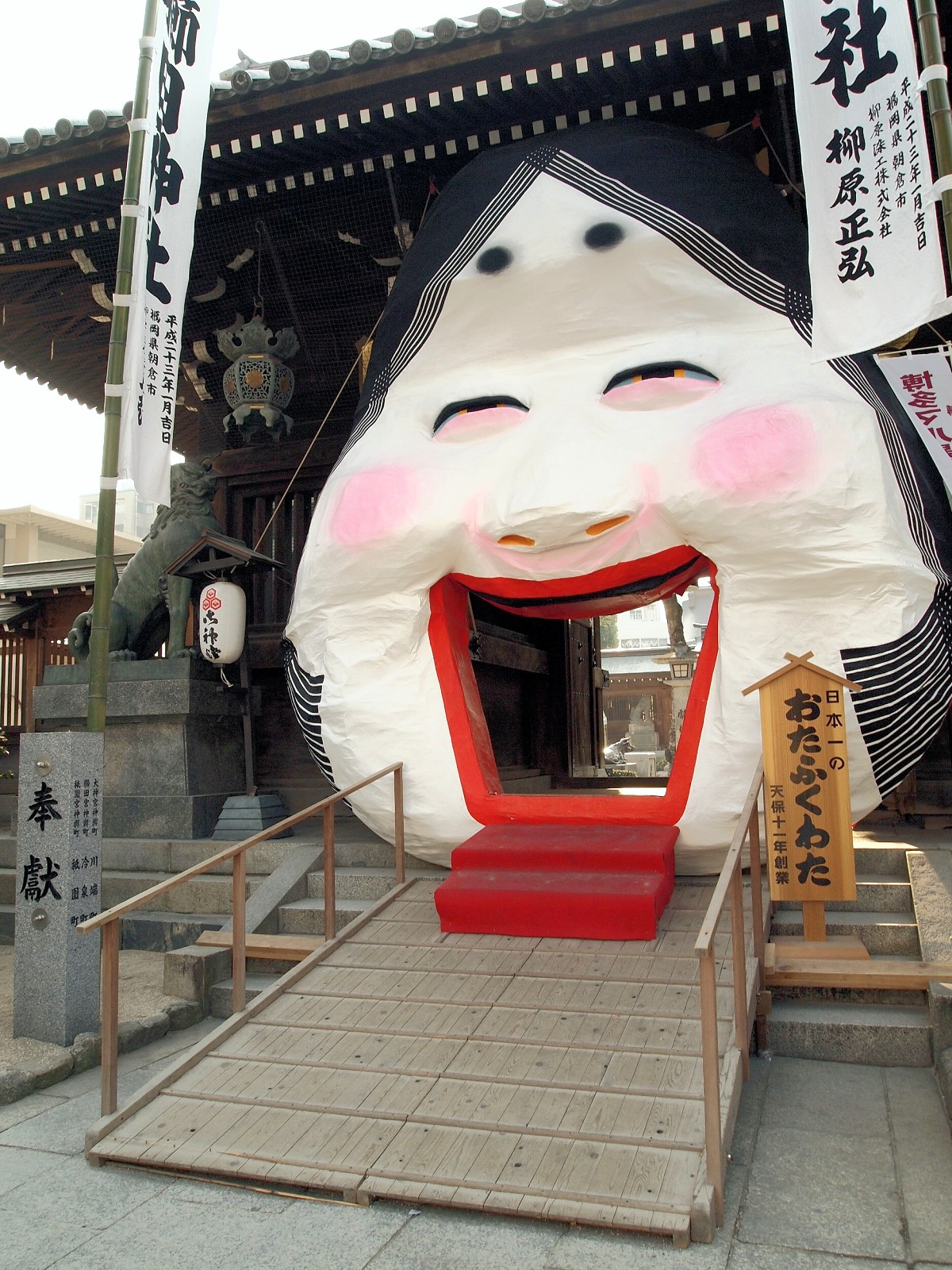 櫛田神社に節分前後に設置されるお多福面